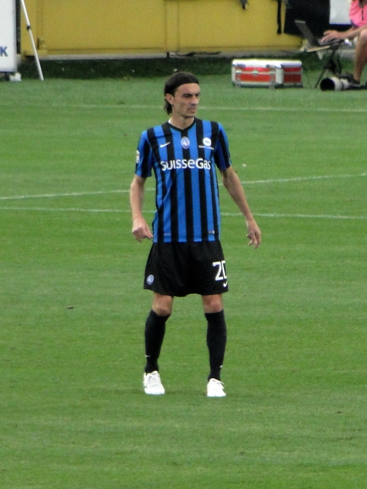 Giuseppe Biava, calciatore italiano, con la maglia dell'Atalanta